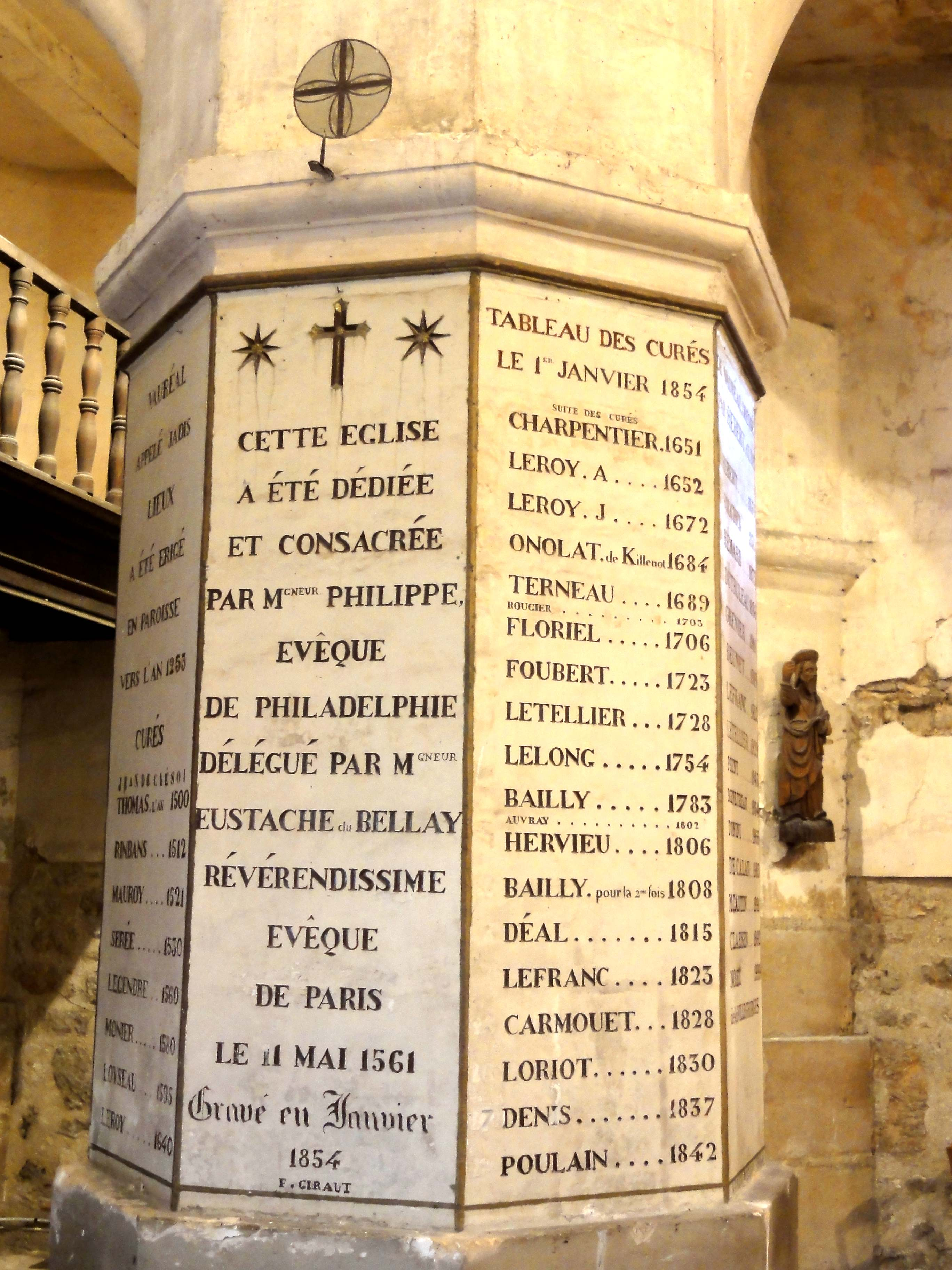 Plaque commémorative de la dédicace et consécration / plaque des curés (2).